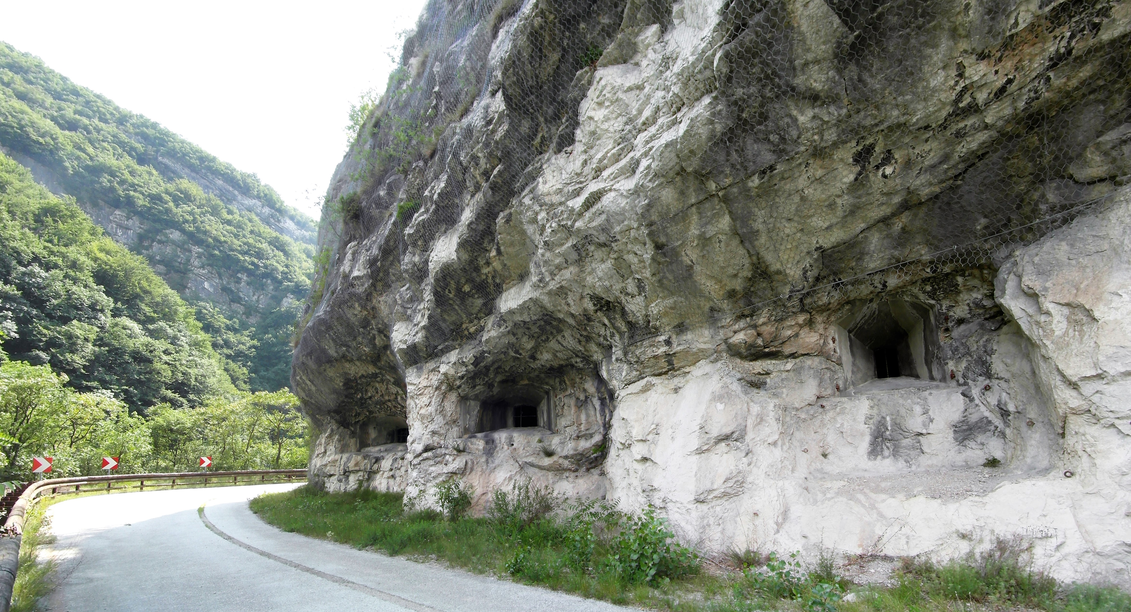 Tagliata stradale inferiore di Civezzano